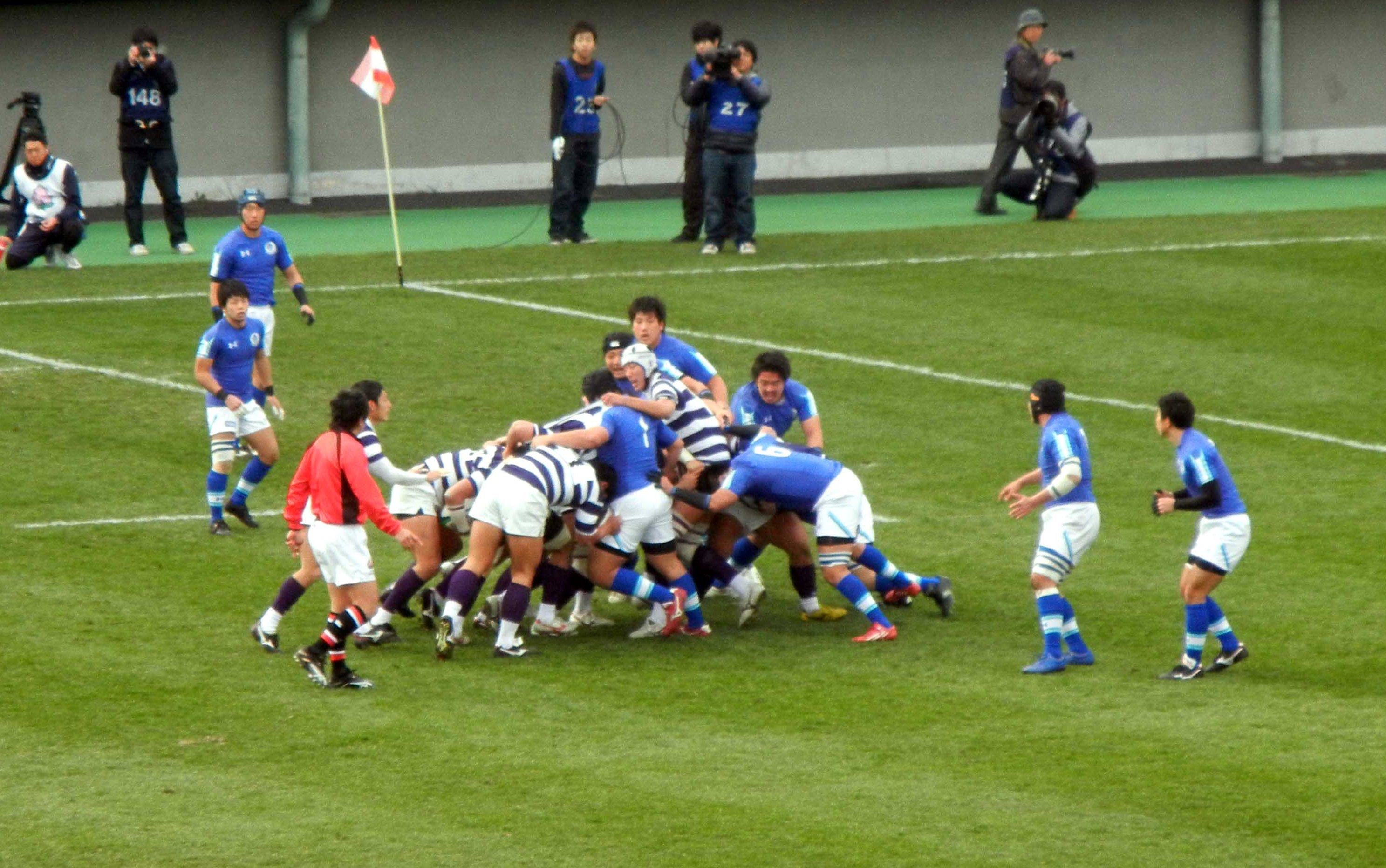 第49回大学ラグビー選手権 東海大学対明治大学